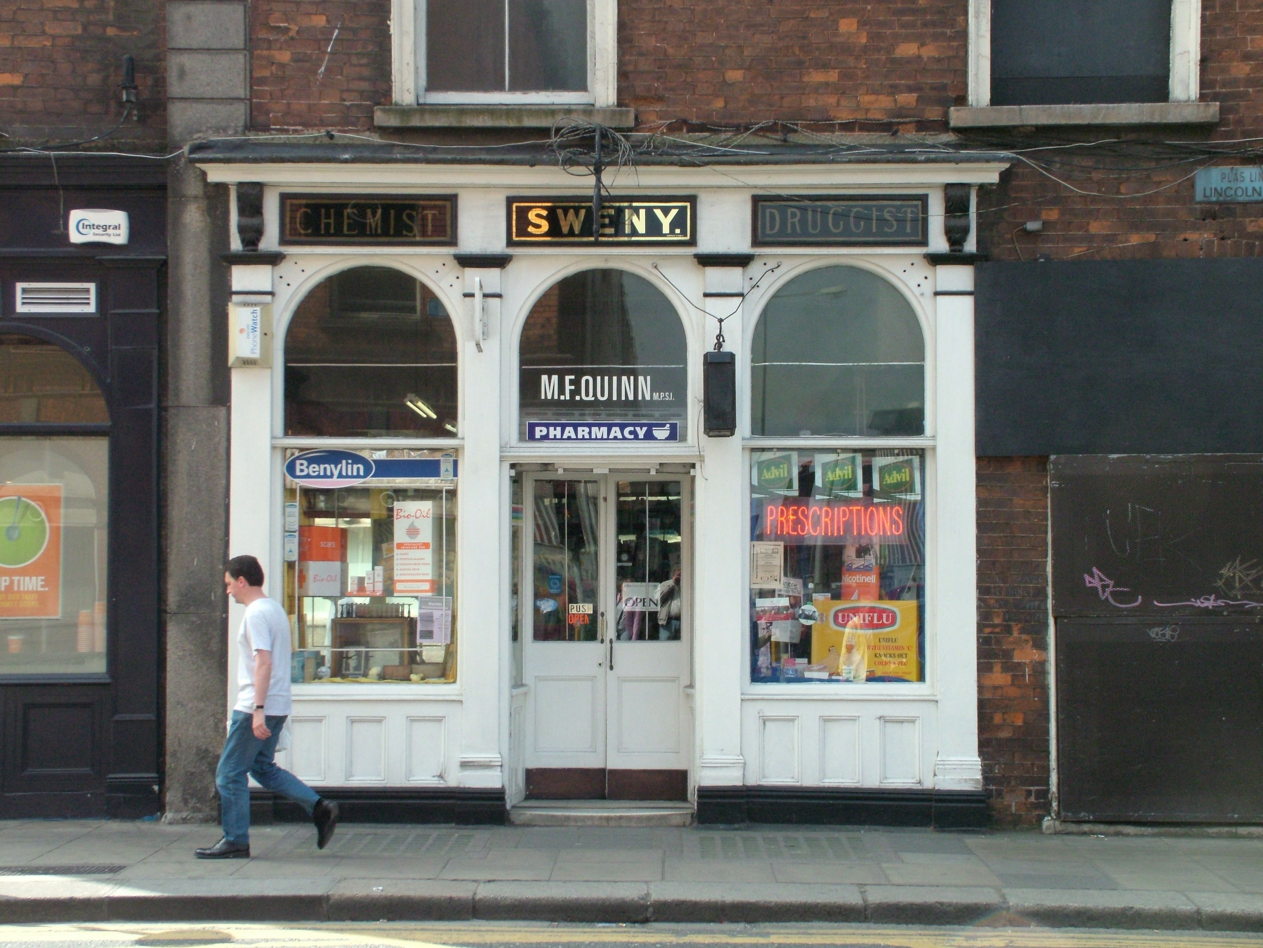 Dublin, Ireland, die Drogerie in der in James Joyce Roman Ulysses die Zitronenseife gekauft wurde